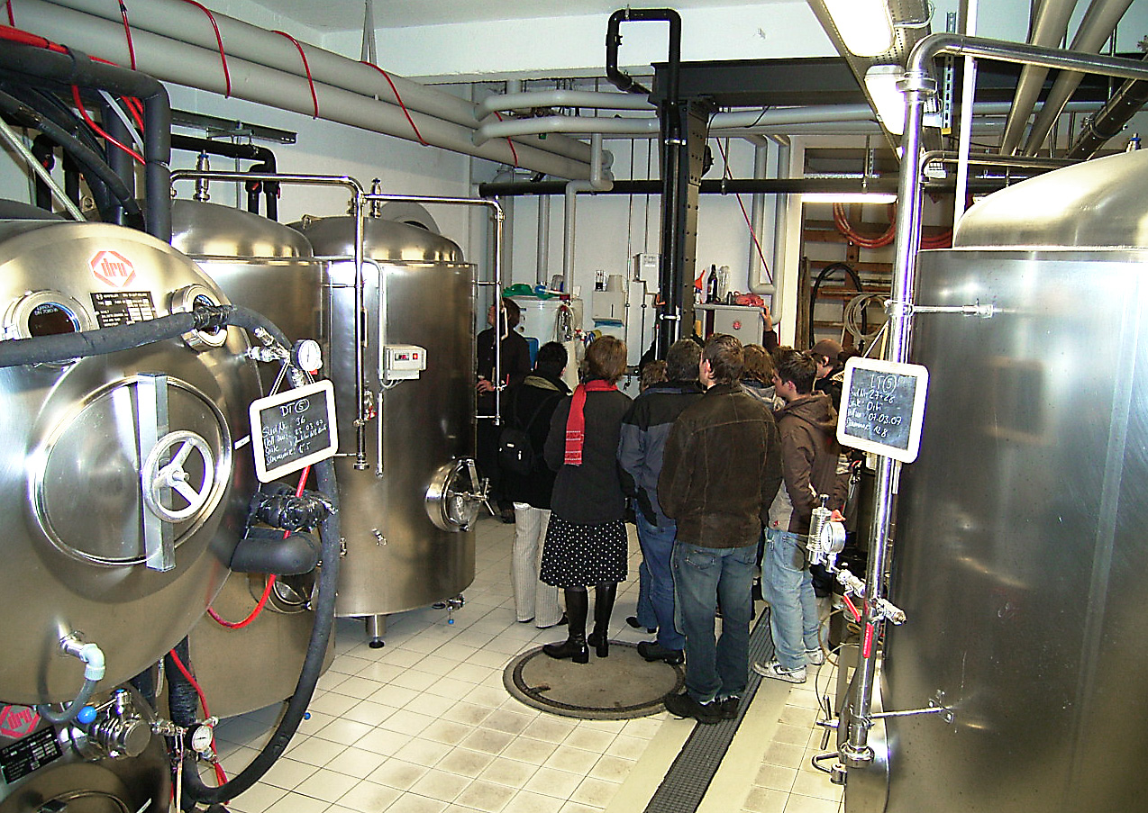 Keller öufibrauerei solothurn